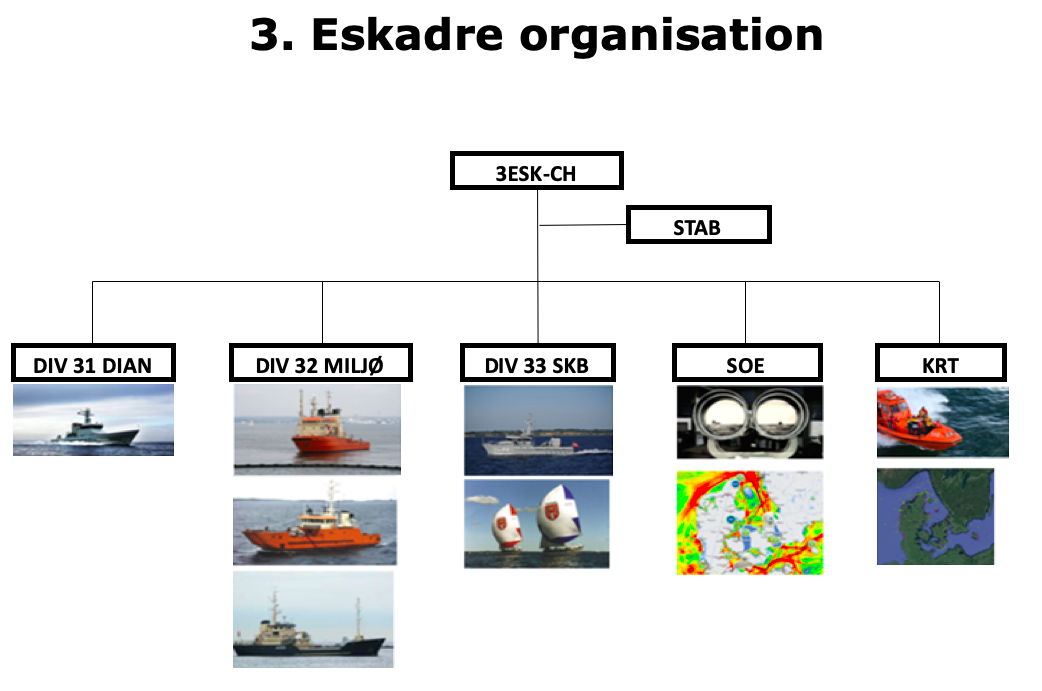 Organisationsdiagram der beskriver Søværnets 3. eskadre